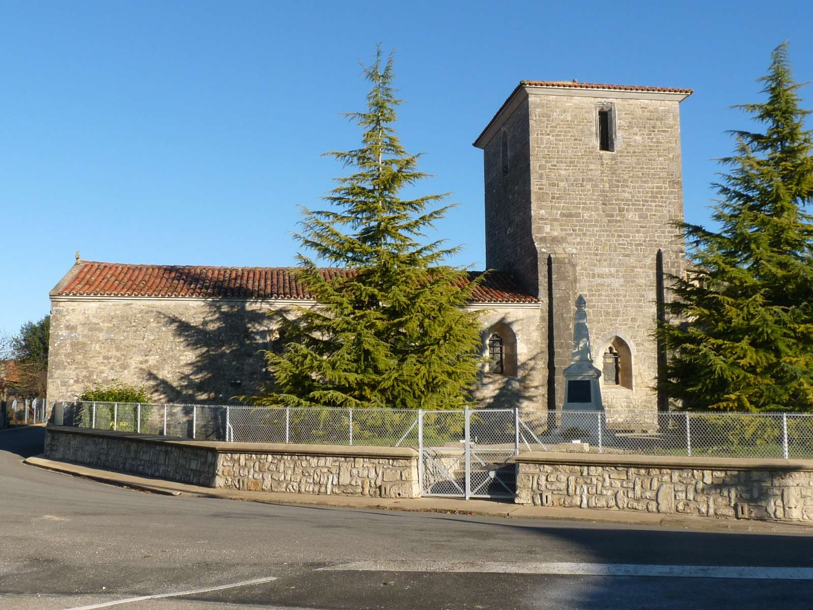 monument aux morts et église de Lonnes, Charente, France